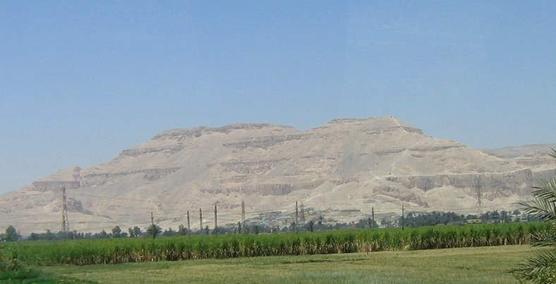 Autoriaus nuotrauka, 2006.04.14. Kalnų grandinė vakariniame Nilo krante, Tėbai, Deir el-Medina (matosi kalno papėdėje). Karalių slėnis prasideda kairėje šio kalno pusėje. Nuotrauka gali būti platinama pagal GFDL licenciją.